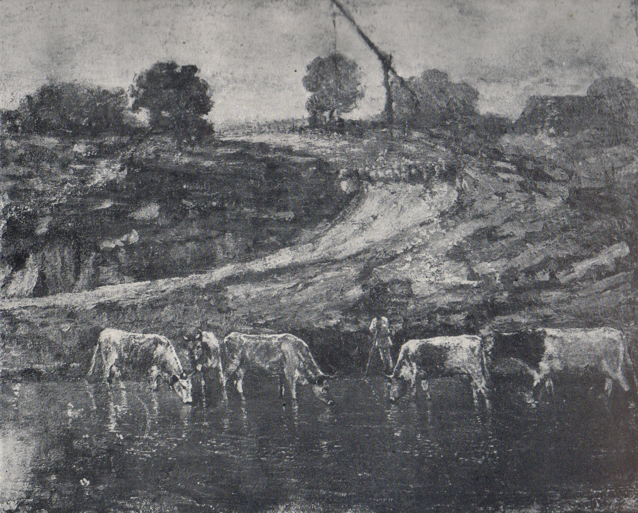 Adăpatul vitelor